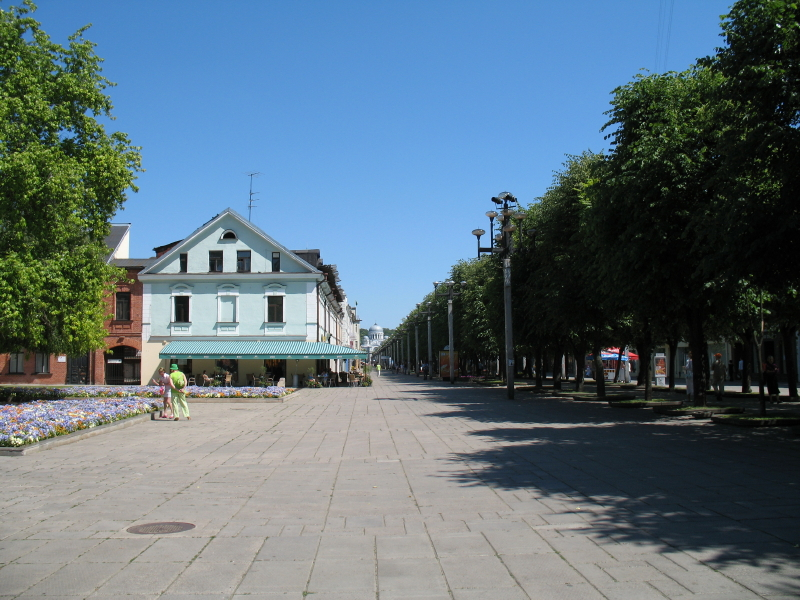 Laisvės alėja Kaune.